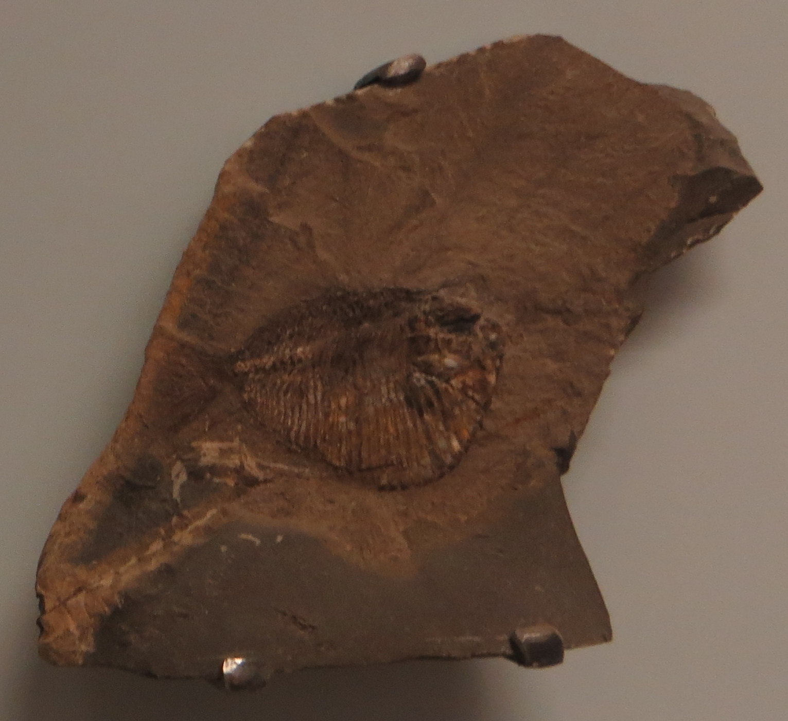 Fossil of Tetragonolepis- Took the picture at Museum am Lowentor, Stuttgart